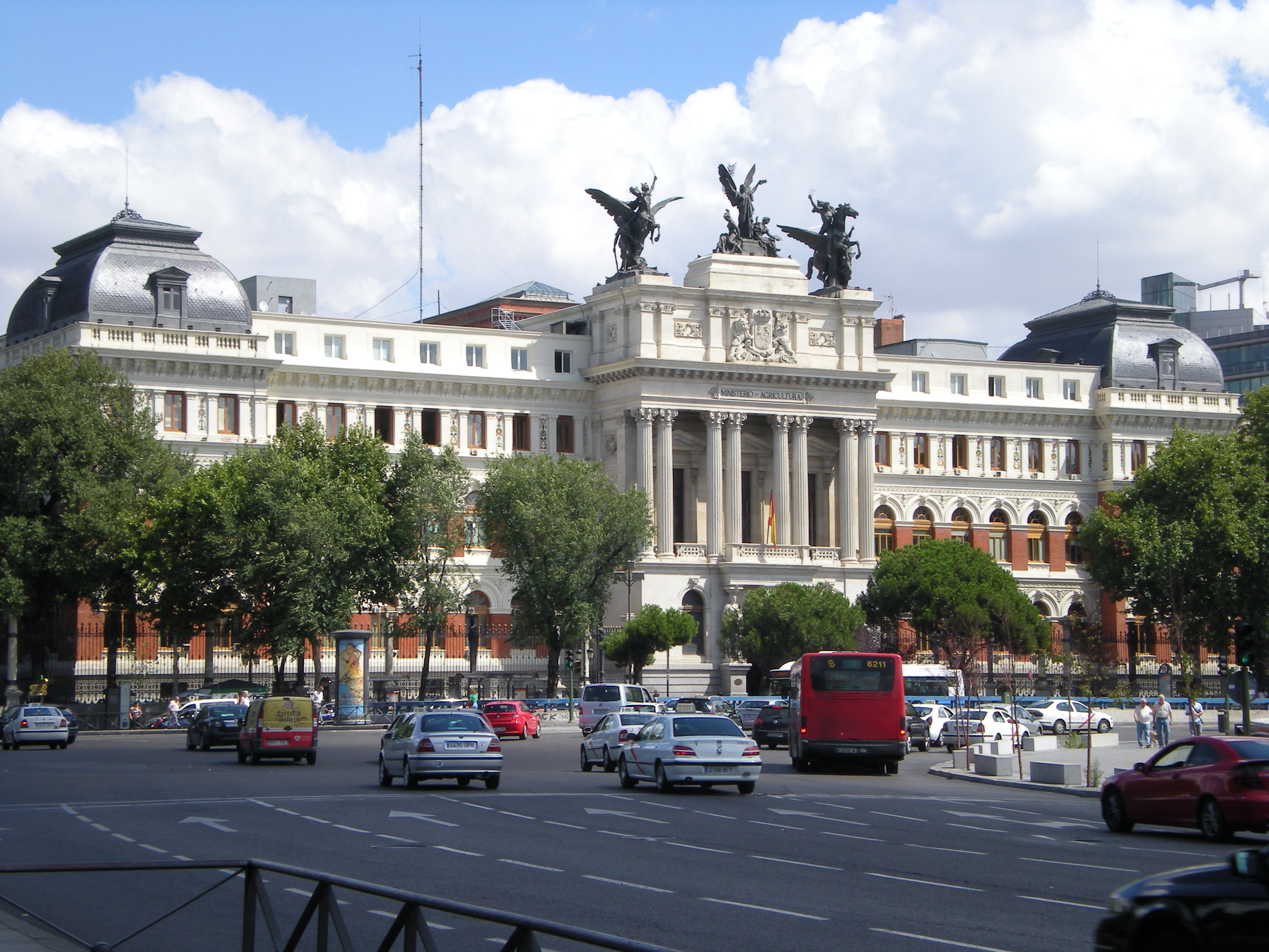 Ministerio de Agricultura Plaza del Emperador Carlos V Madrid Comunidad de Madrid España